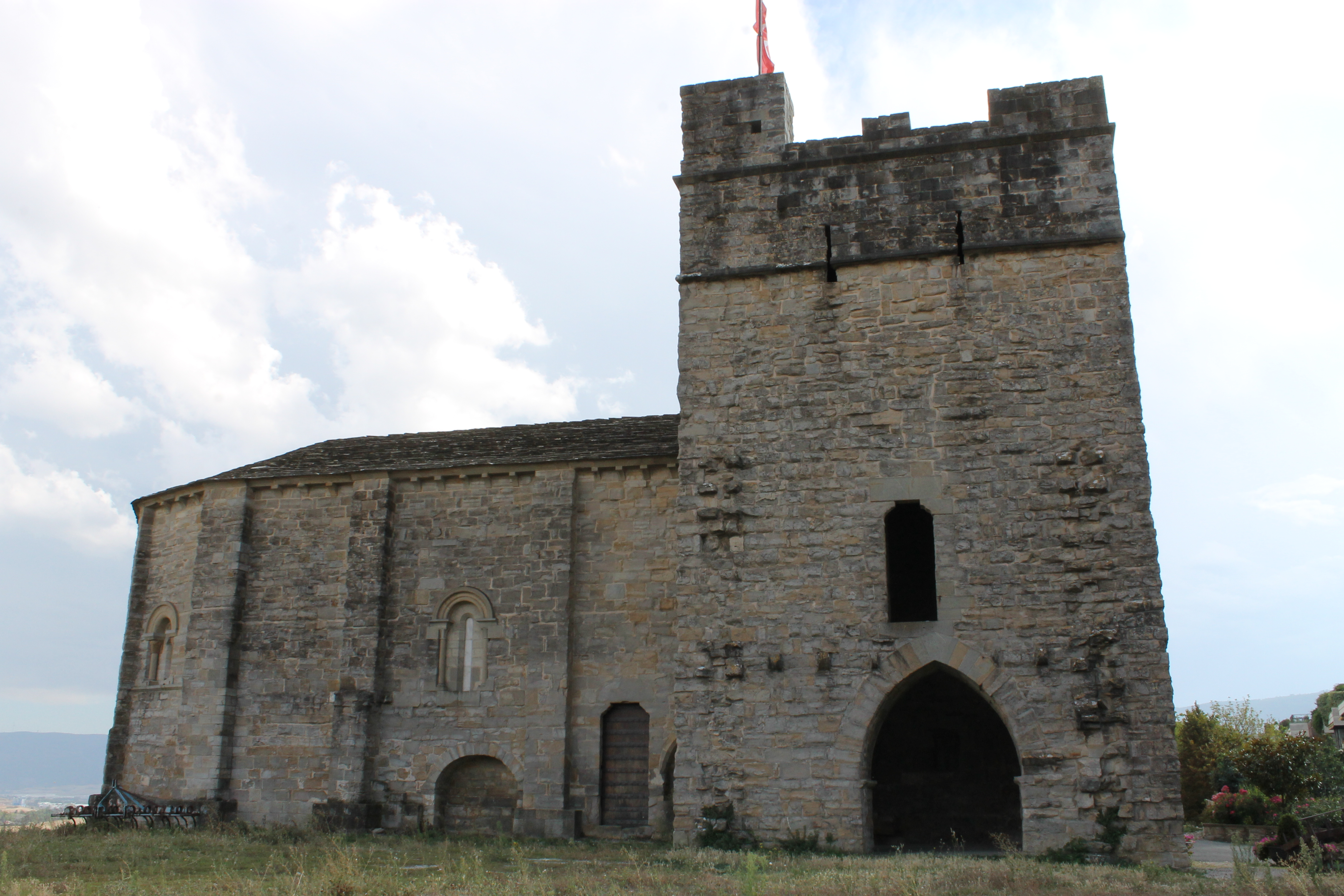 Exterior Iglesia Sanjuanista